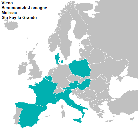 Mapa representativo da viagem de Edith Schwalb.